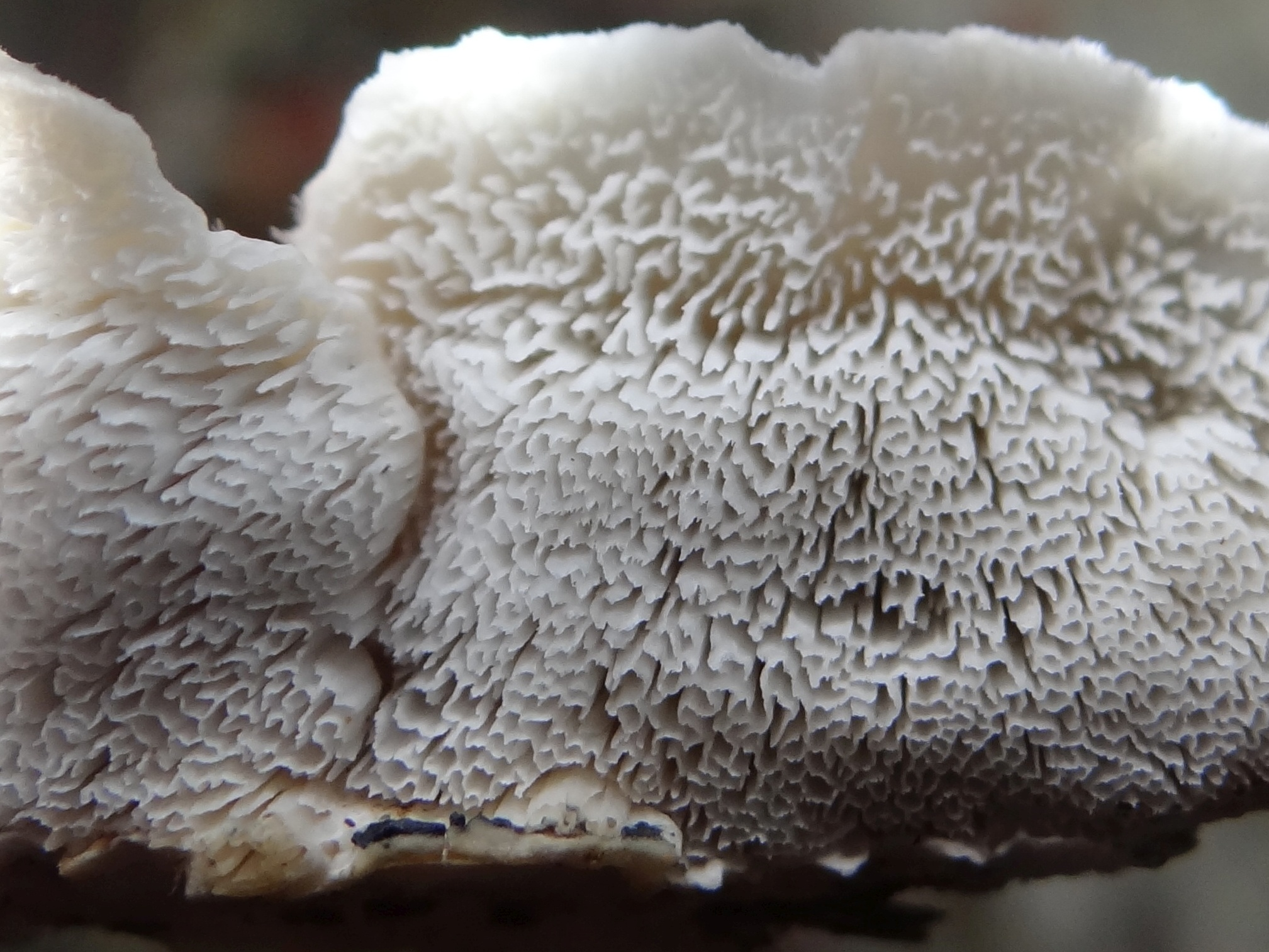 Postia caesia (location: Poland, Beskid Wyspowy,Mogielica)